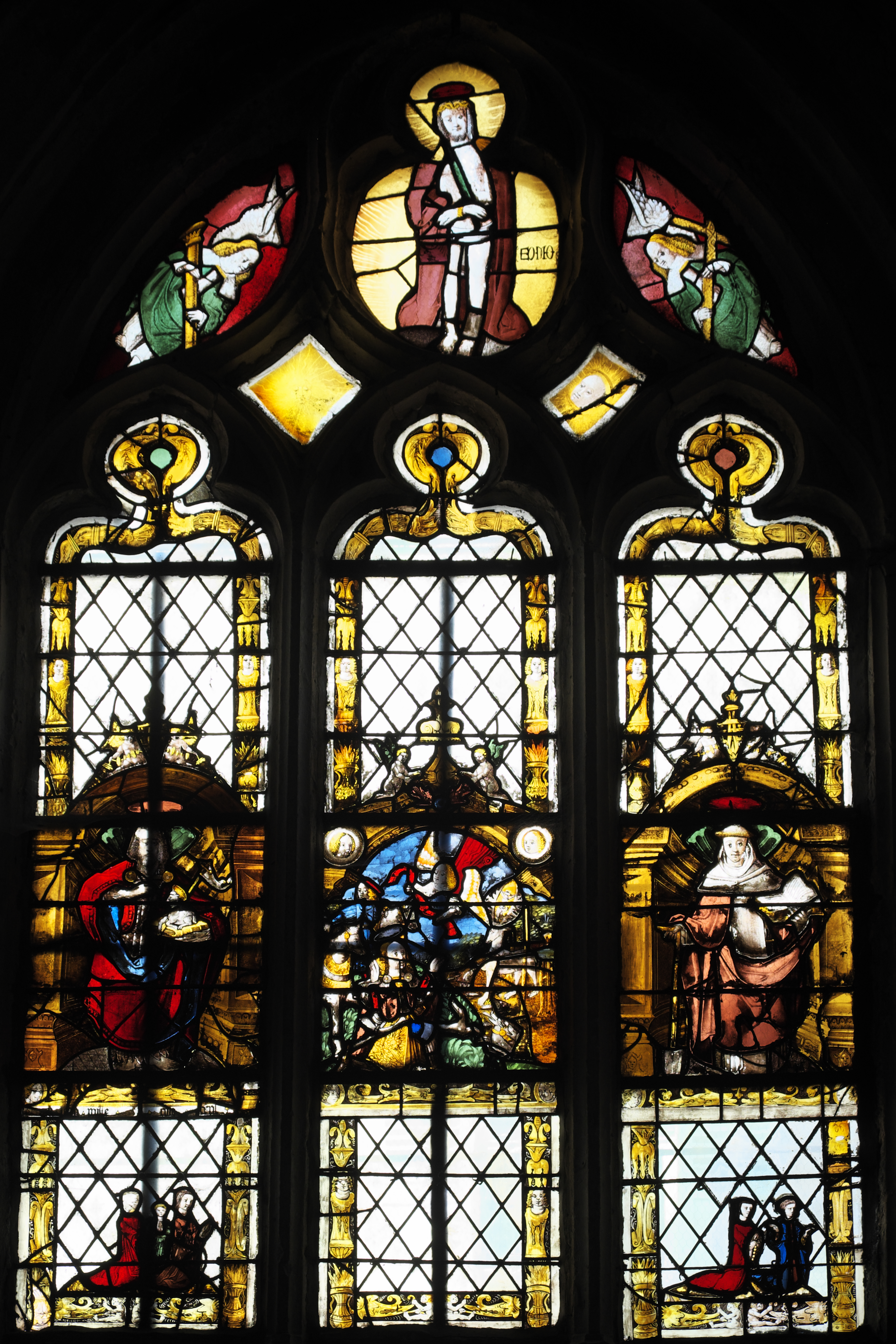 Katholische Pfarrkirche Saint-Martin in Triel-sur-Seine im Département Yvelines (Île-de-France/Frankreich), Bleiglasfenster (n° 13) mit der Jahreszahl MILLE CINQ CENT (1500); Darstellung: Ecce Homo (im Maßwerk), mittlere Scheiben: Johannes der Täufer, heiliger Hubertus, heiliger Fiacrius, unten: Stifter